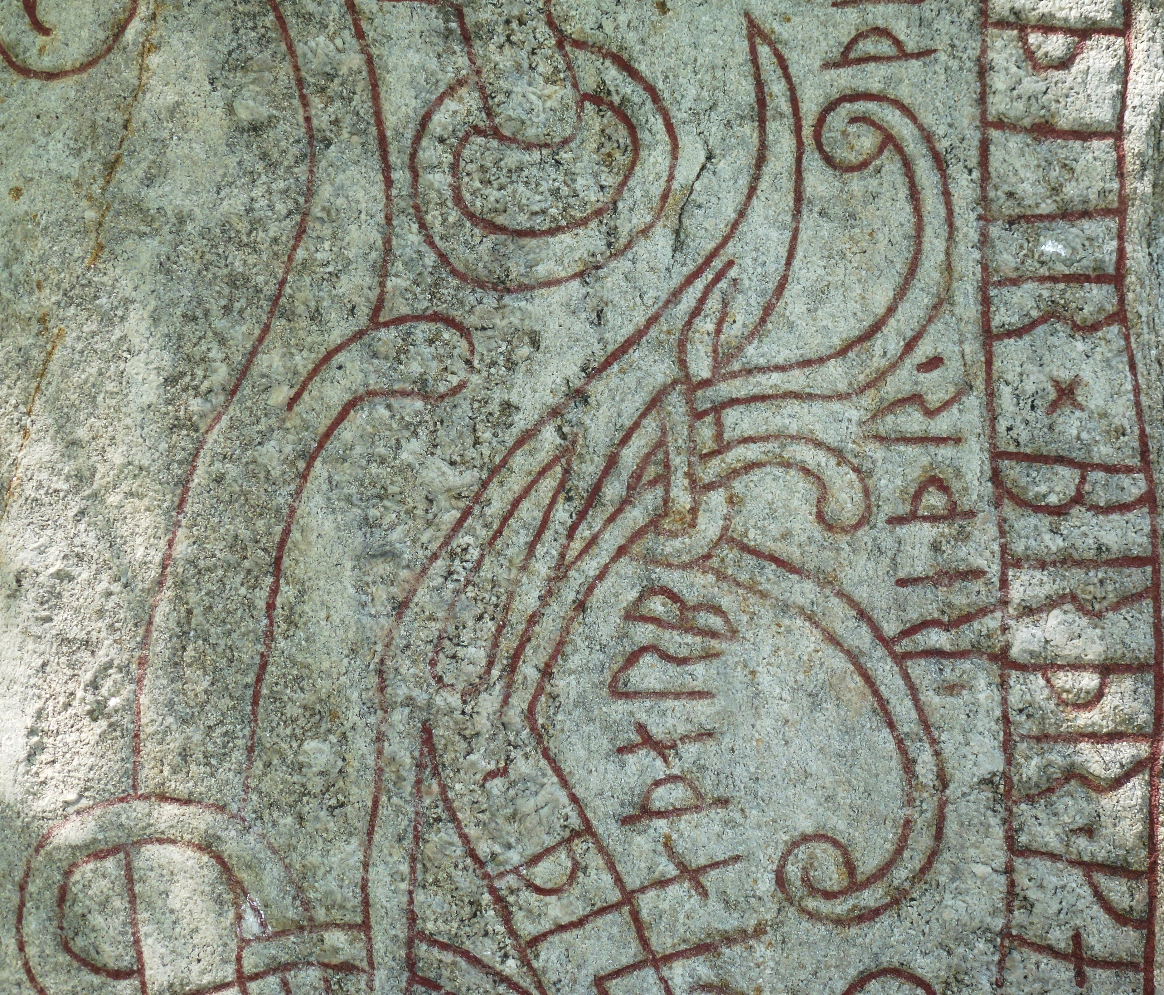 Upplands runinskrifter U 73, detalj